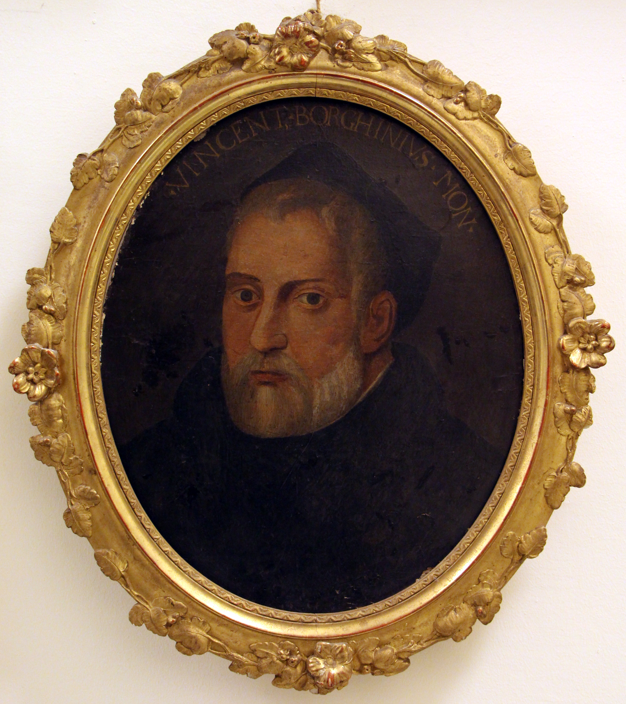 National Central Library of Florence